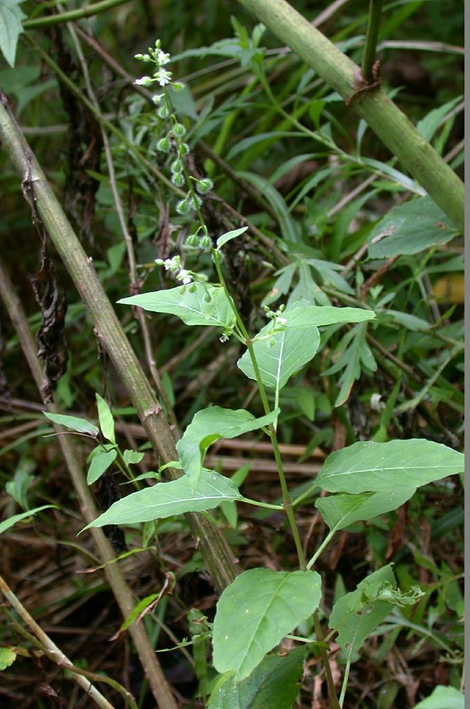 Circaea mollis：ミズタマソウ 2003/09/14 和歌山県田辺市：Tanabe City. Wakayama pref. Japan